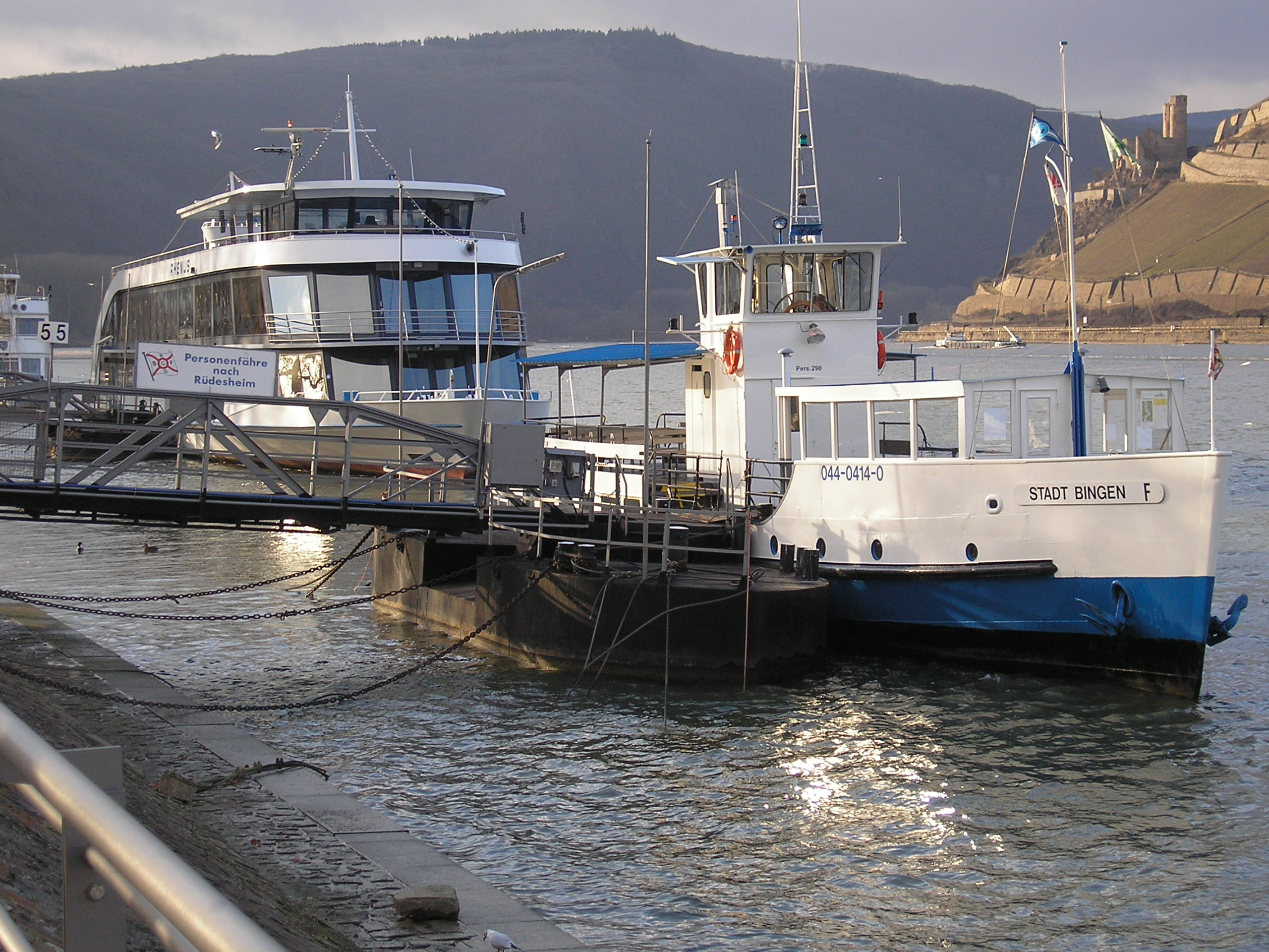 Personenfähre Stadt Bingen am Anleger Bingen